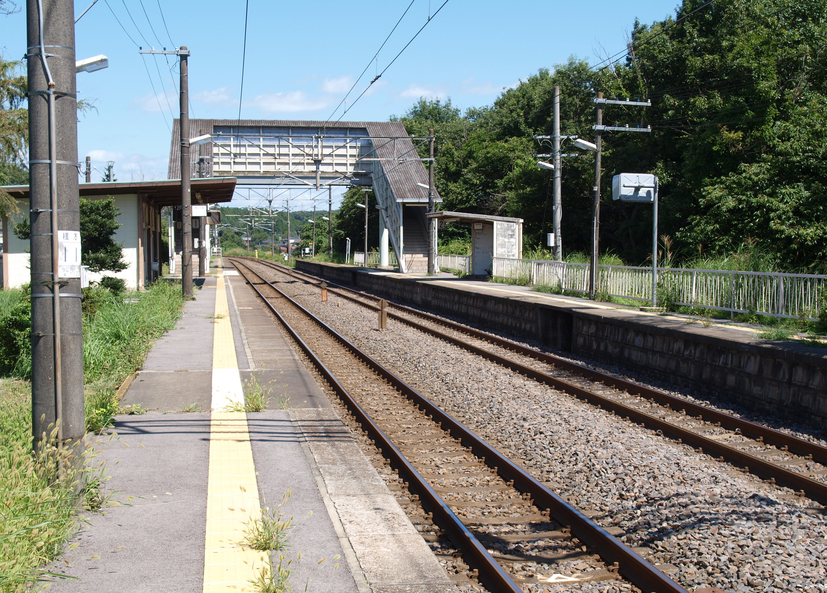 高久駅ホーム